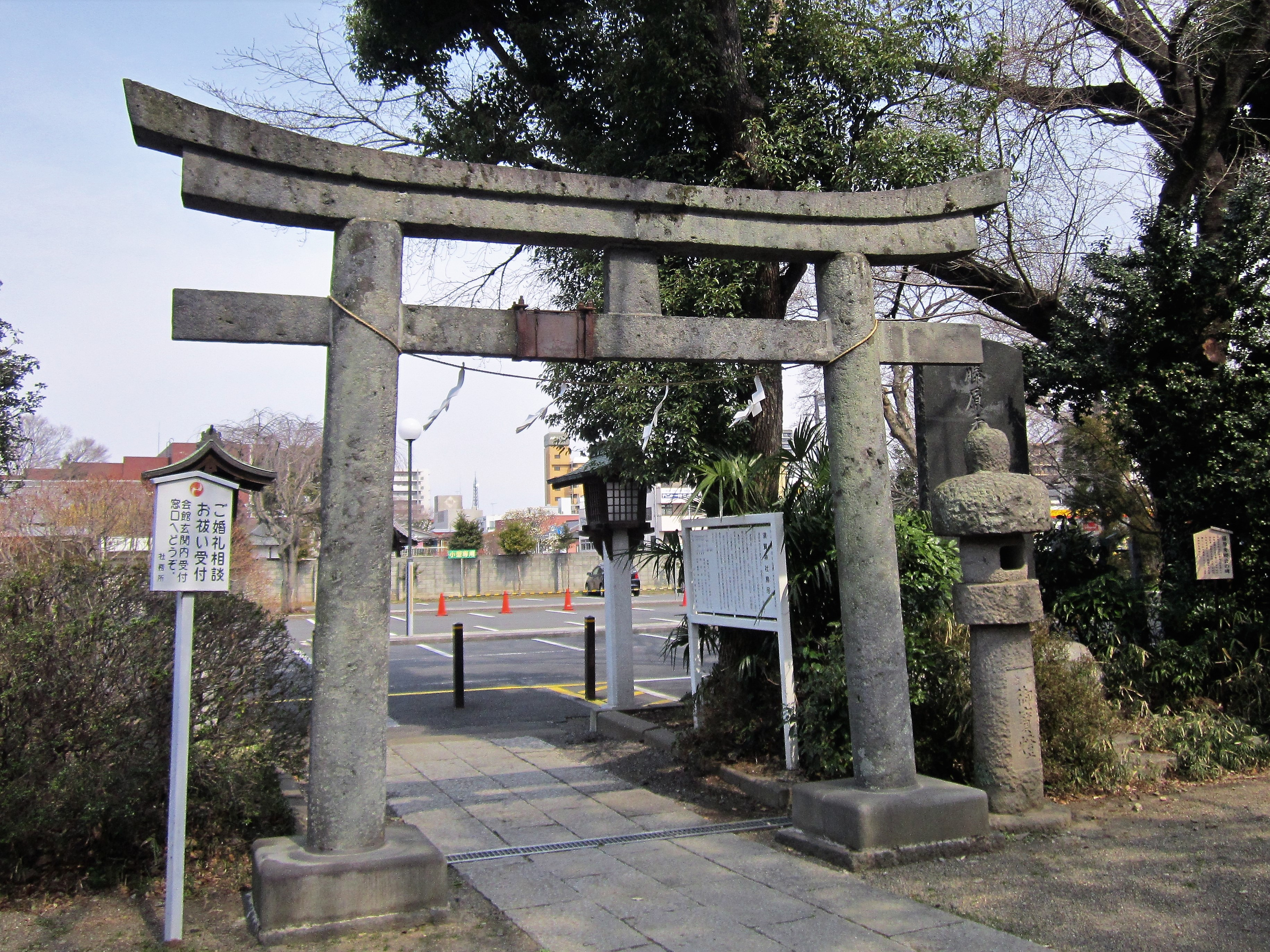 須賀神社（小山市宮本町）の石鳥居 Canon PowerShot A2200